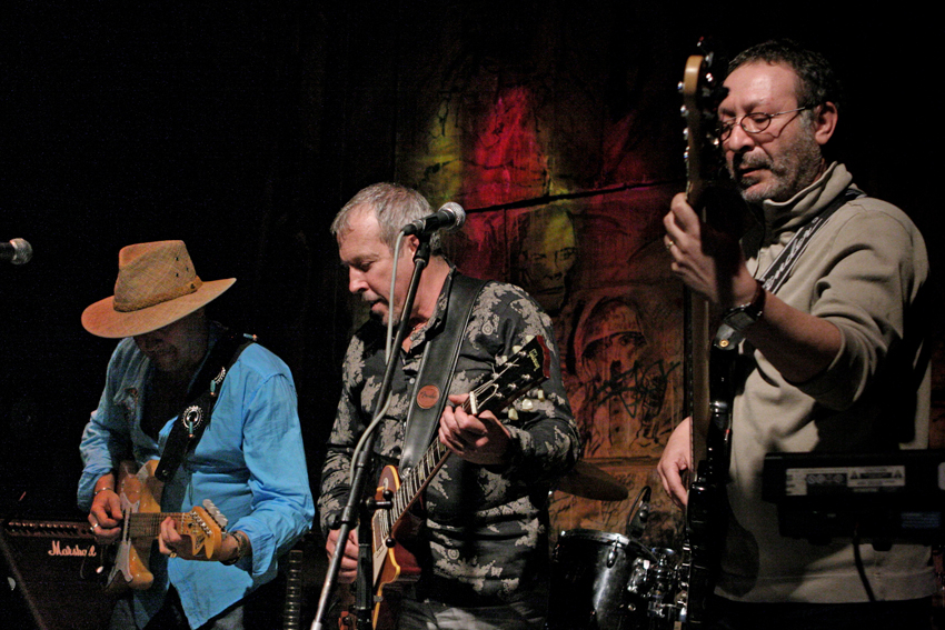 А. Белов, А.Макаревич, Е.Маргулис